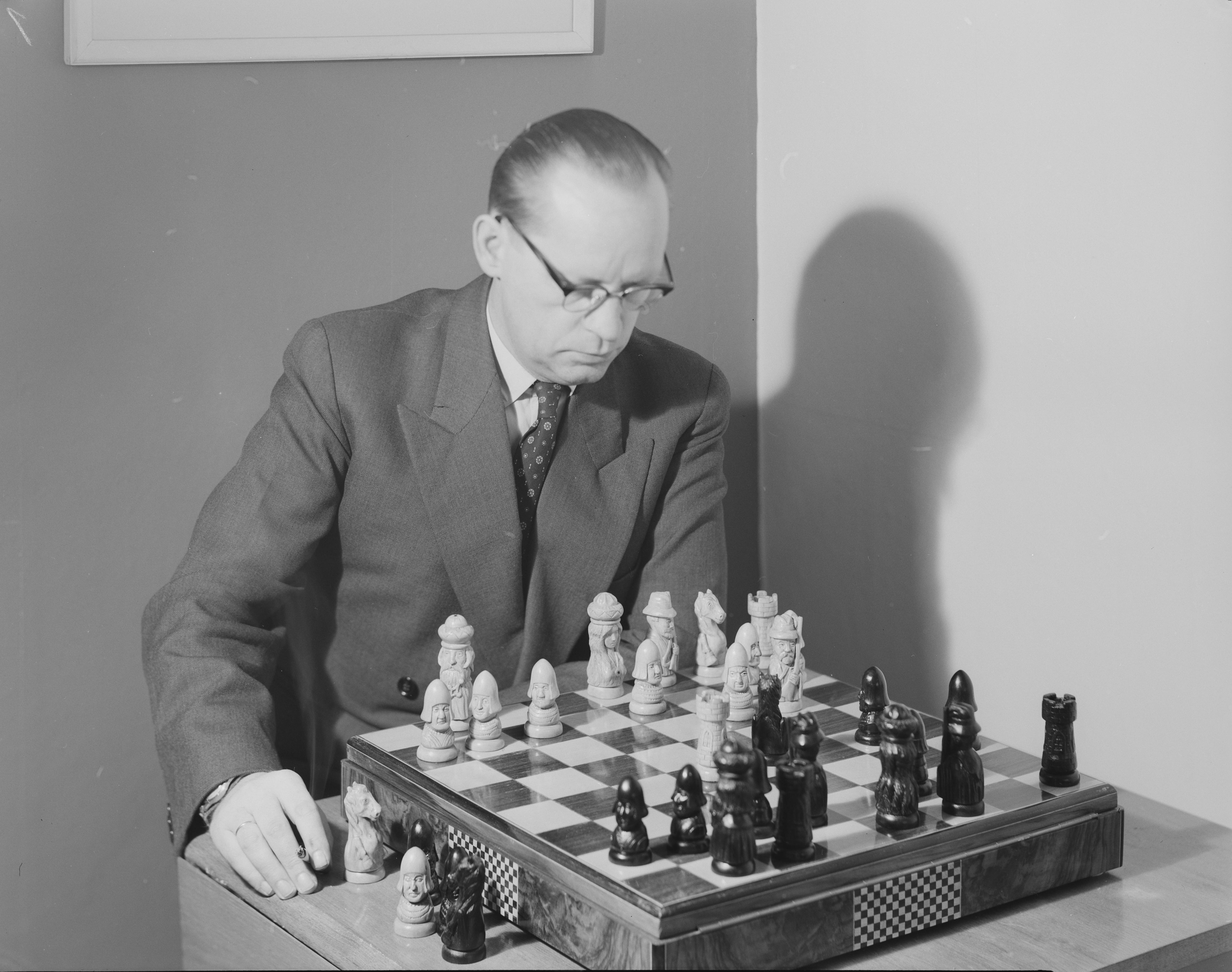 Bildet er hentet fra Nasjonalbibliotekets bildesamling. Anmerkninger til bildet var: Fotograf:Ukjent Depicted person: Barda, Olaf